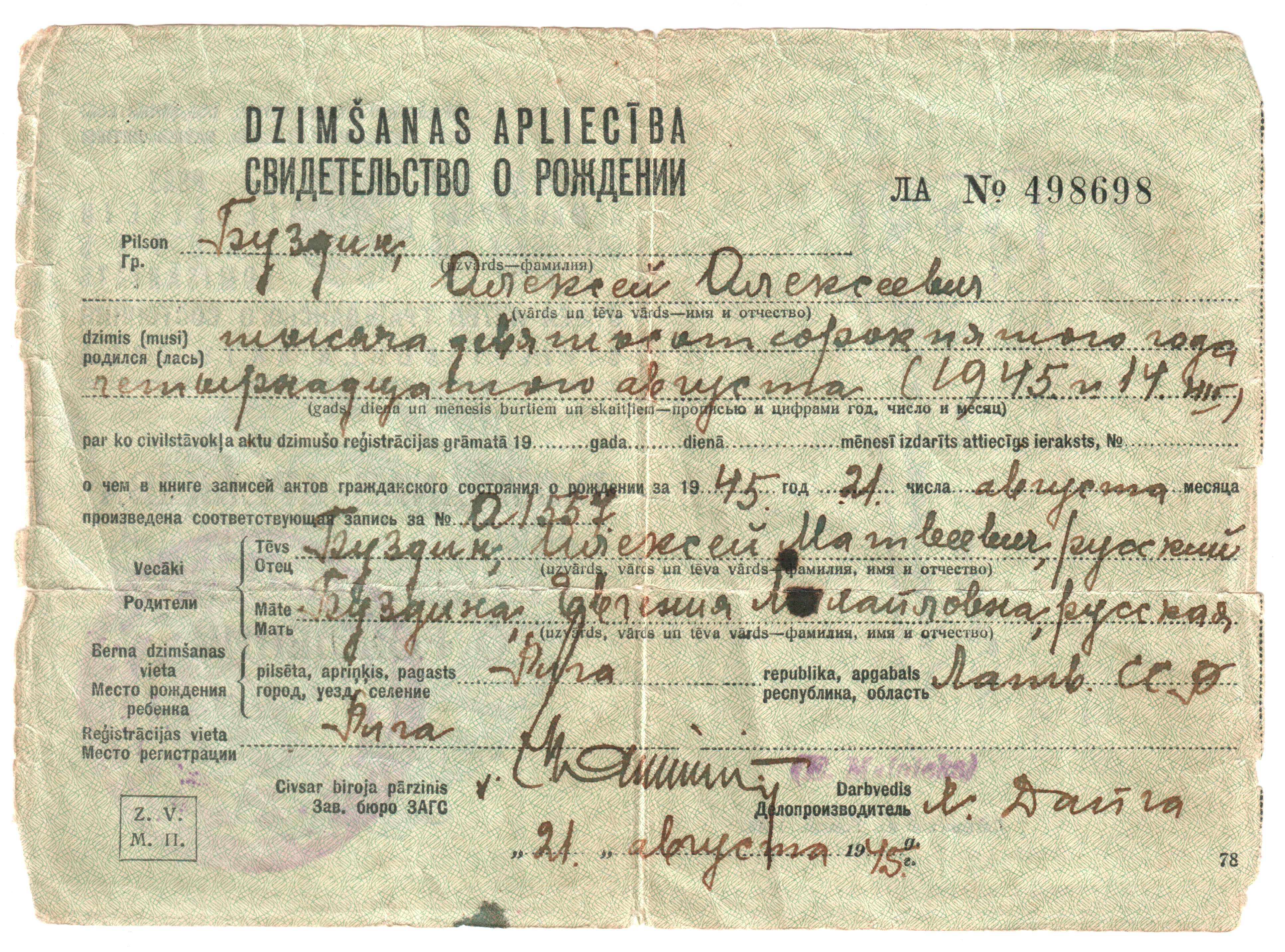 Свидетельство о рождении